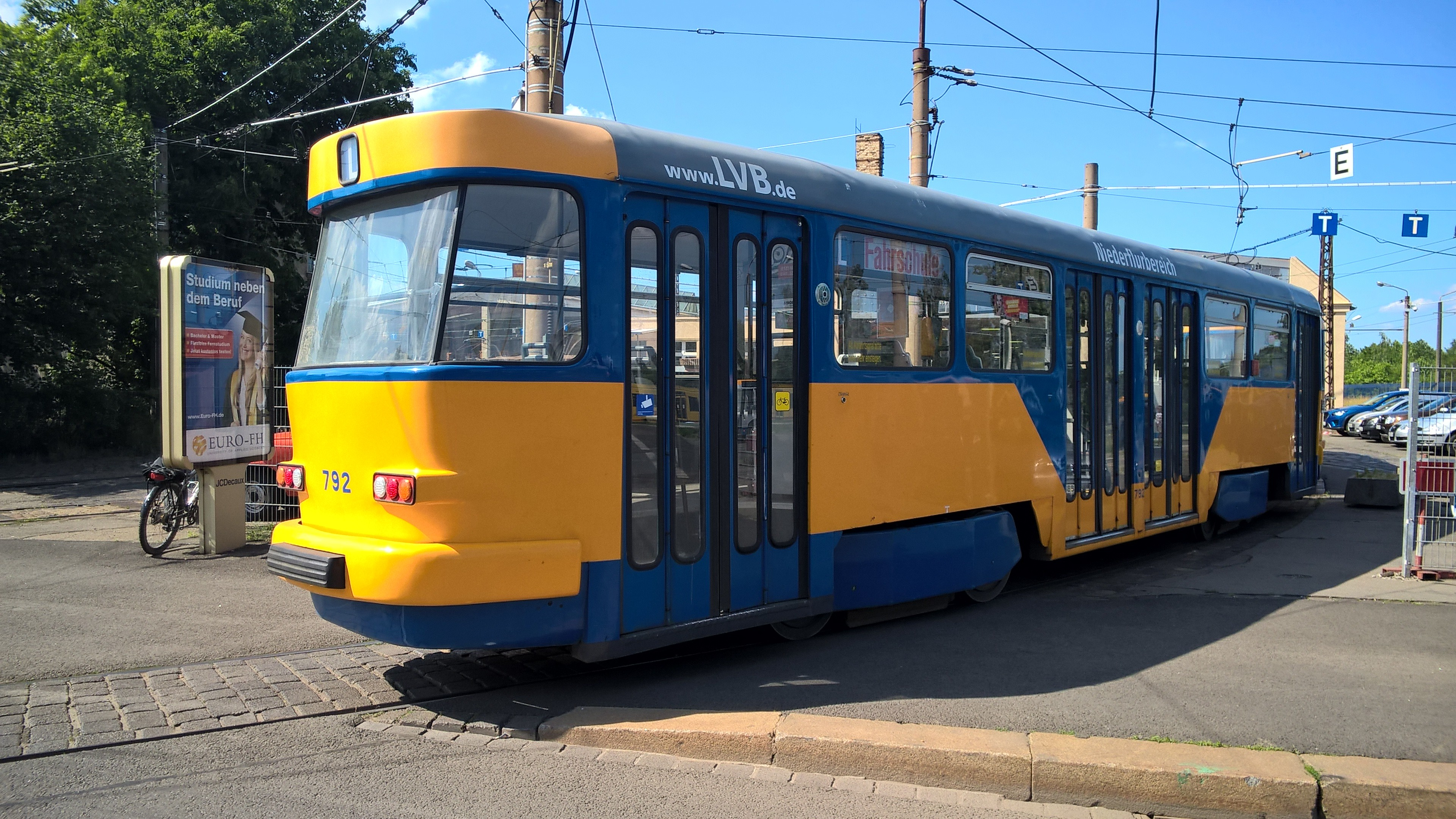 Typ 65d, B4D-NF, 2002 im Rahmen einer Hauptuntersuchung zum »Fahrradmobil« mit zwischen den Drehgestellen abgesenktem Wagenboden umgebaut. Durch den nicht mehr durchgehenden Wagenboden ist die Druckfestigkeit eingeschränkt, das Abschieben eines liegengebliebenen Zuges ist deshalb nicht möglich. Aus diesem Grund wurde die Kupplung am B-Ende entfernt und das Wagenende mit einer Schürze verschlossen.